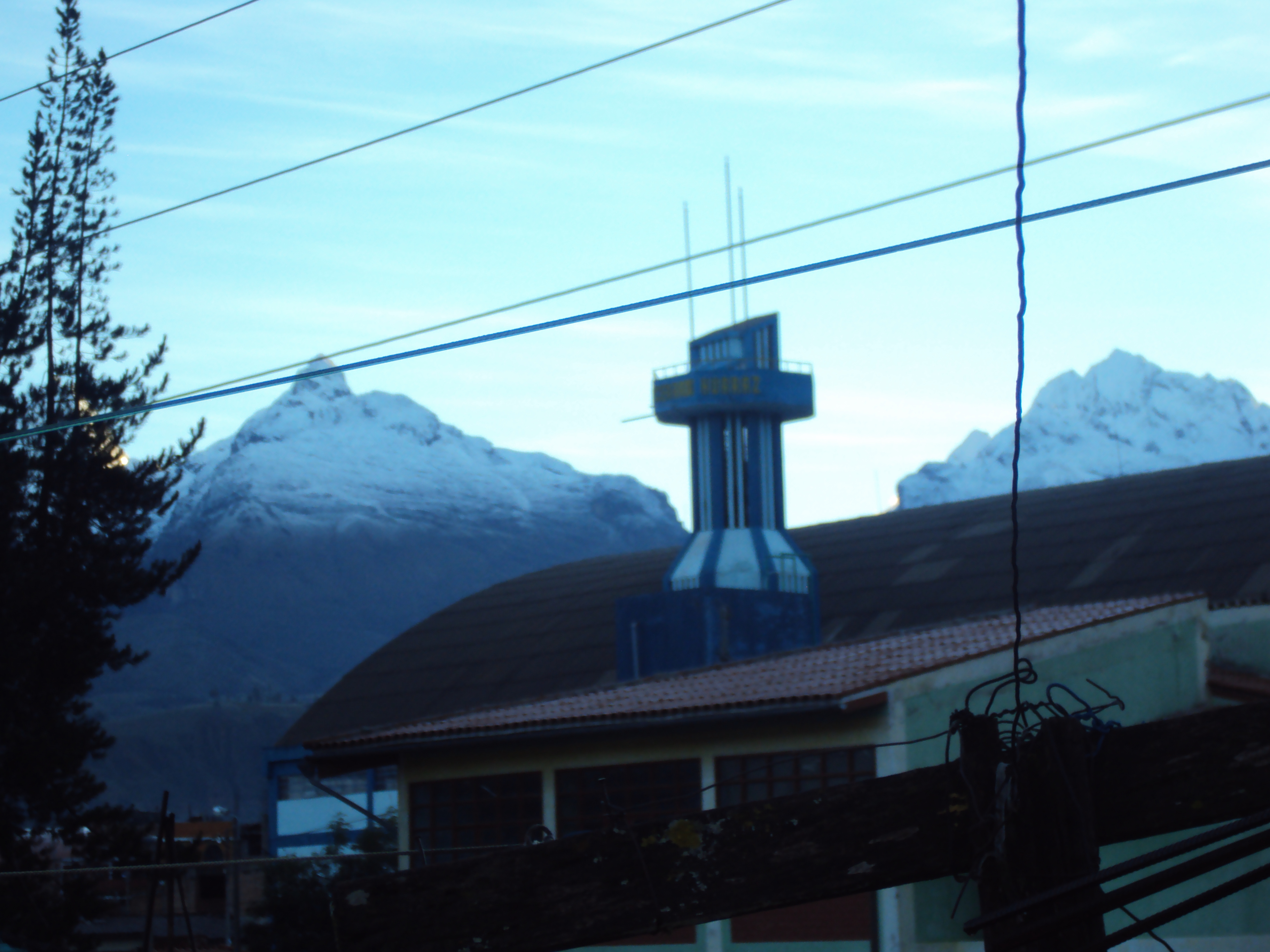 Coliseo Cerrado de Huaraz, nevados Rima Rima y Churup